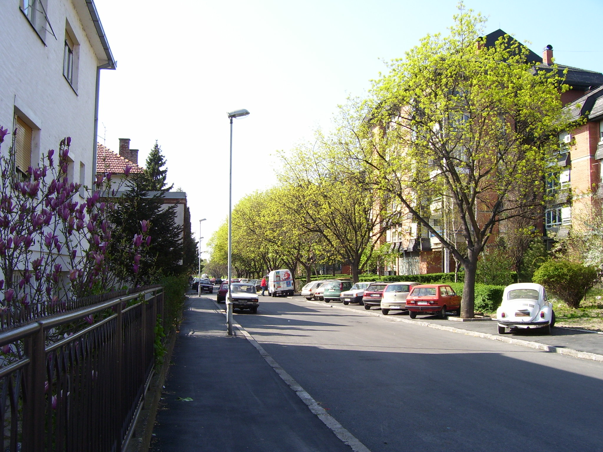 Ulice v Bělehradě, v místní části Galenika, Srbsko